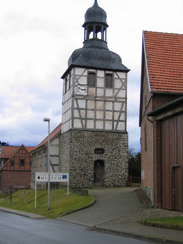 Kirche in Molmerswende, Mansfelder Land, Sachsen-Anhalt